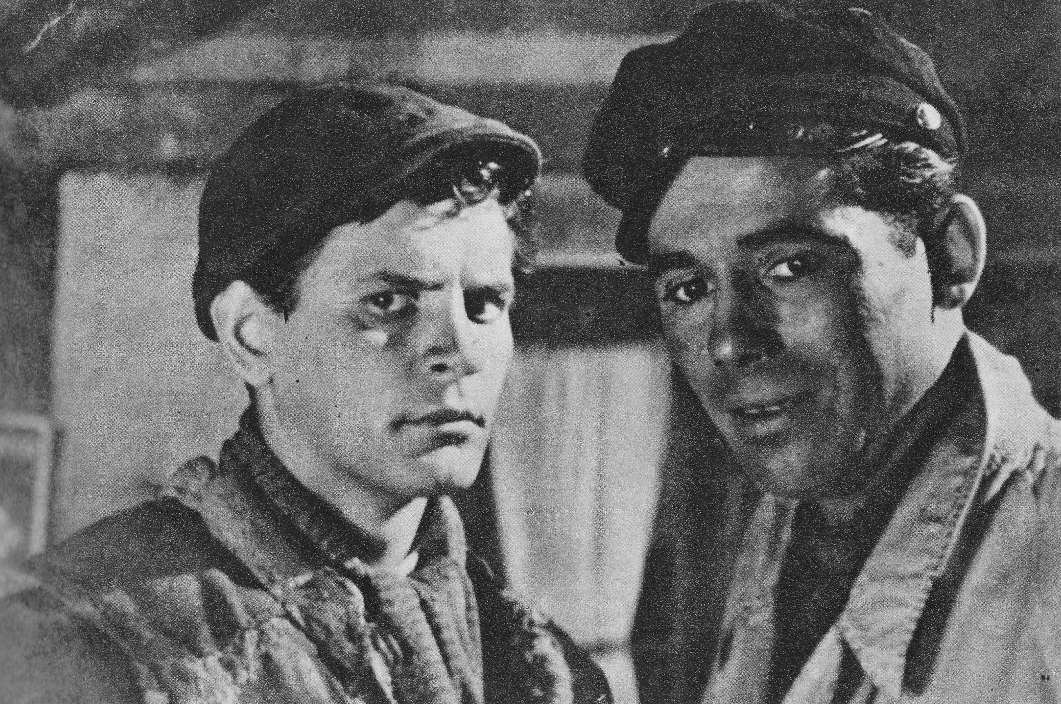 Tadeusz Łomnicki i Tadeusz Janczar, kadr z filmu Pokolenie